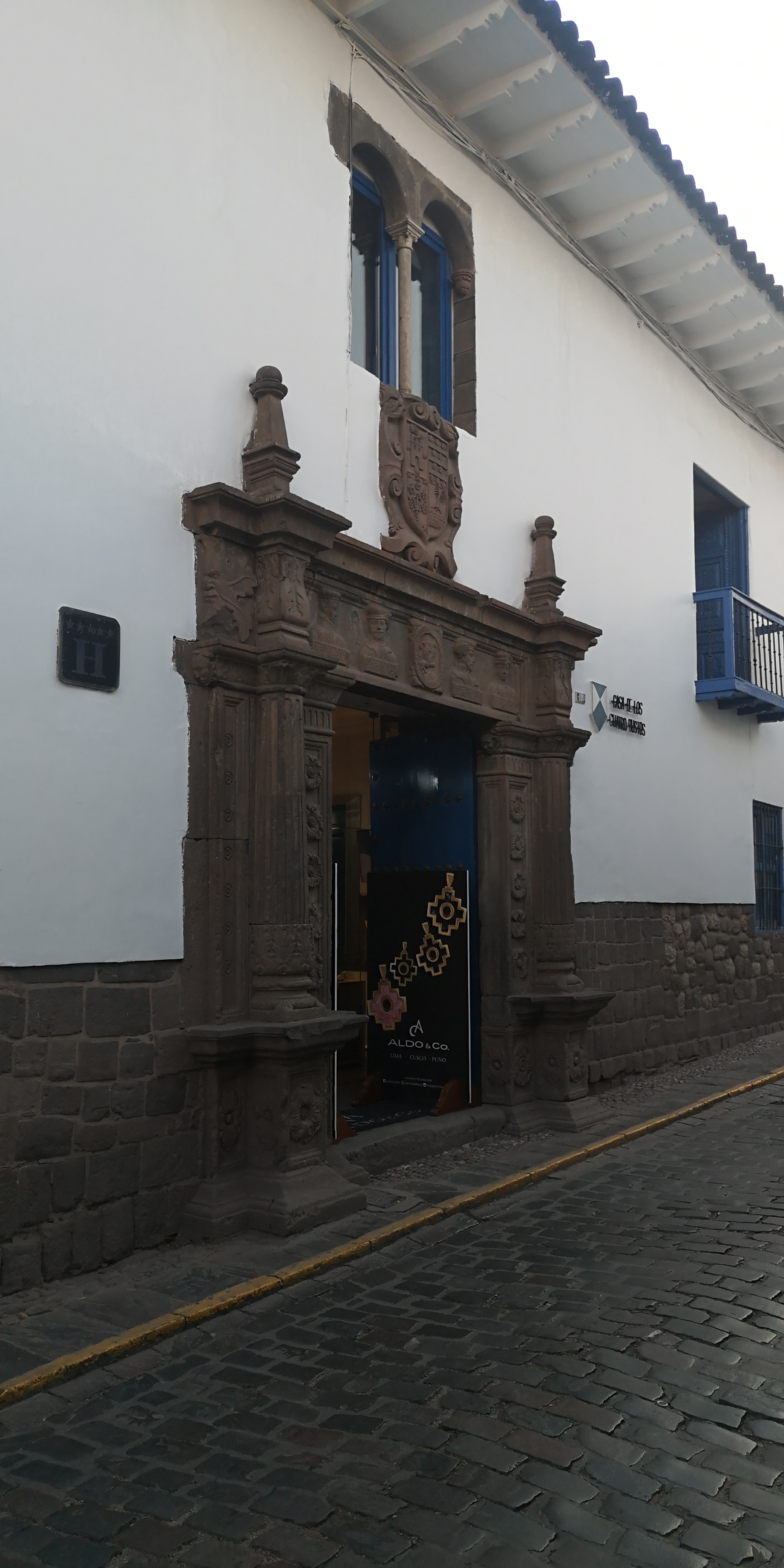 Puerta de la casa de los cuatro bustos en la calle San Agustín del Cusco, Perú